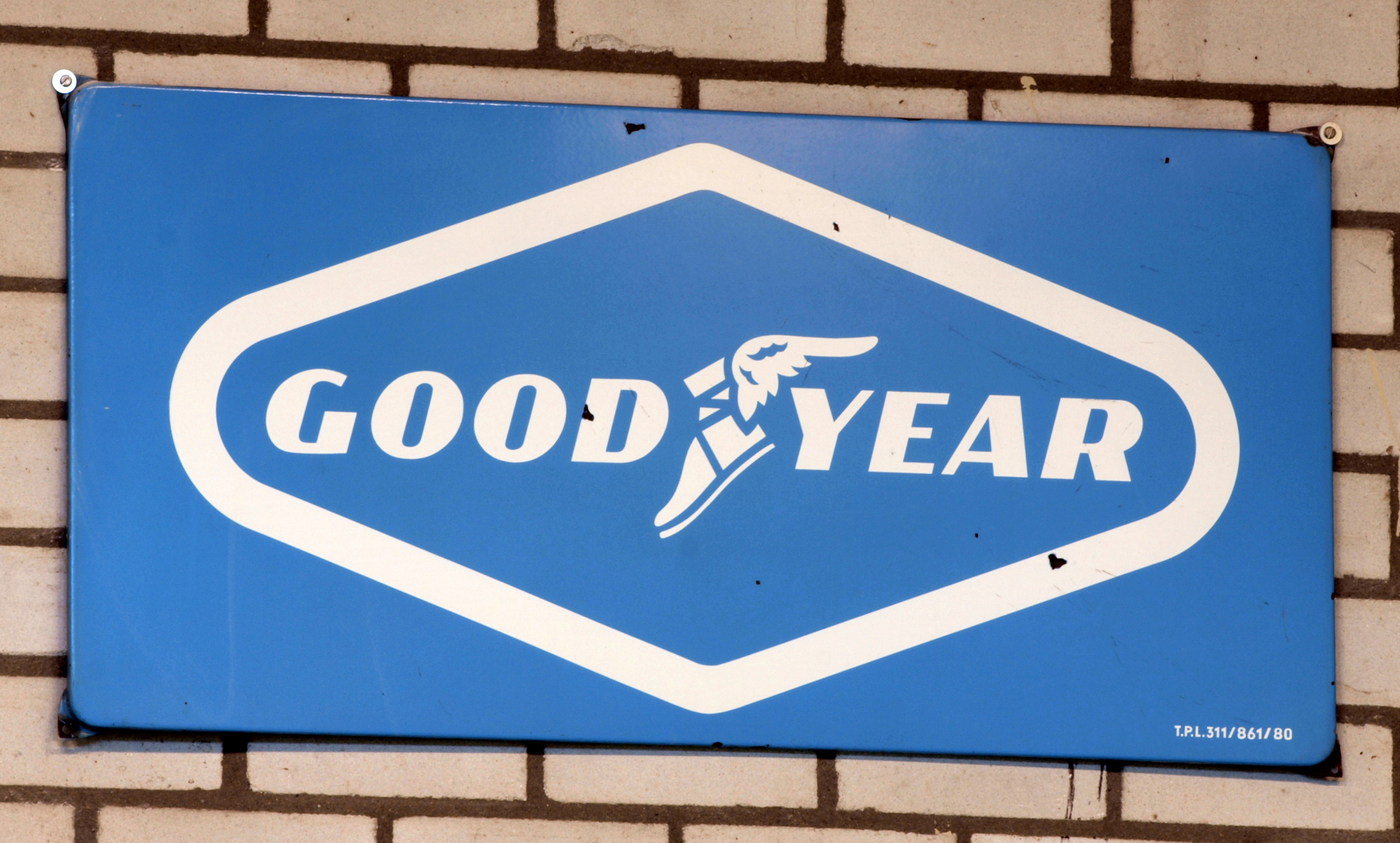 Den Hartogh Ford Museum.